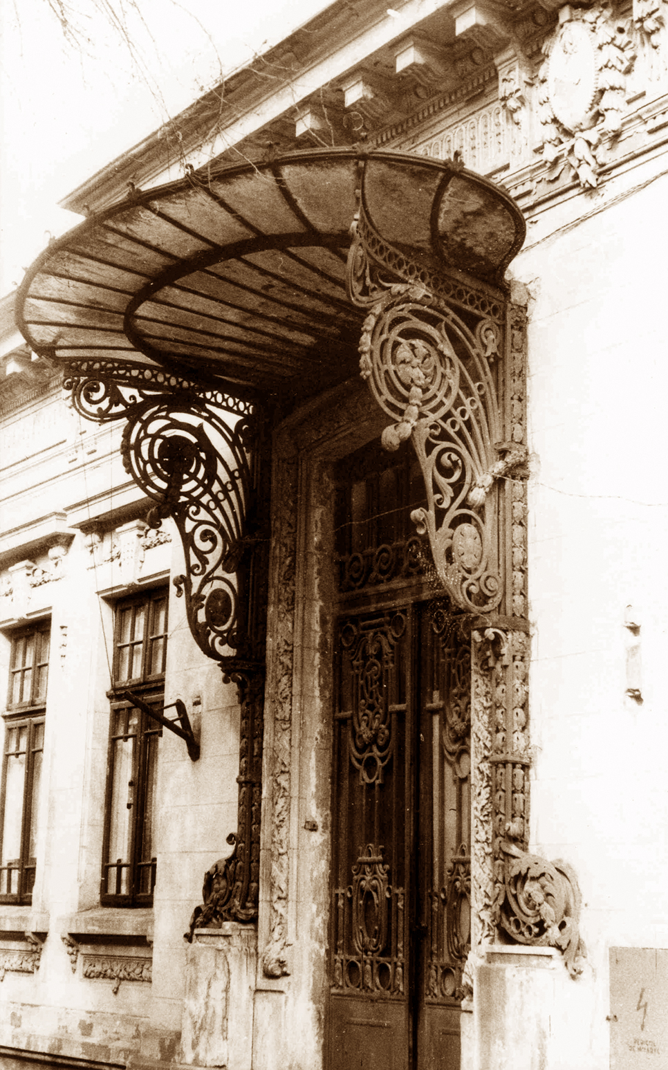 Casa, Calea Călărașilor 67 sector 3, Bucuresti